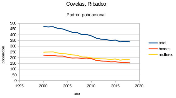 Padrón poboacional. Covelas, Ribadeo. Datos de